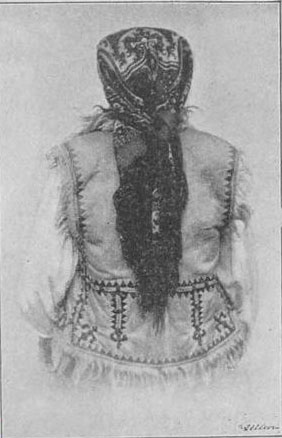 Молодиця з Брустур